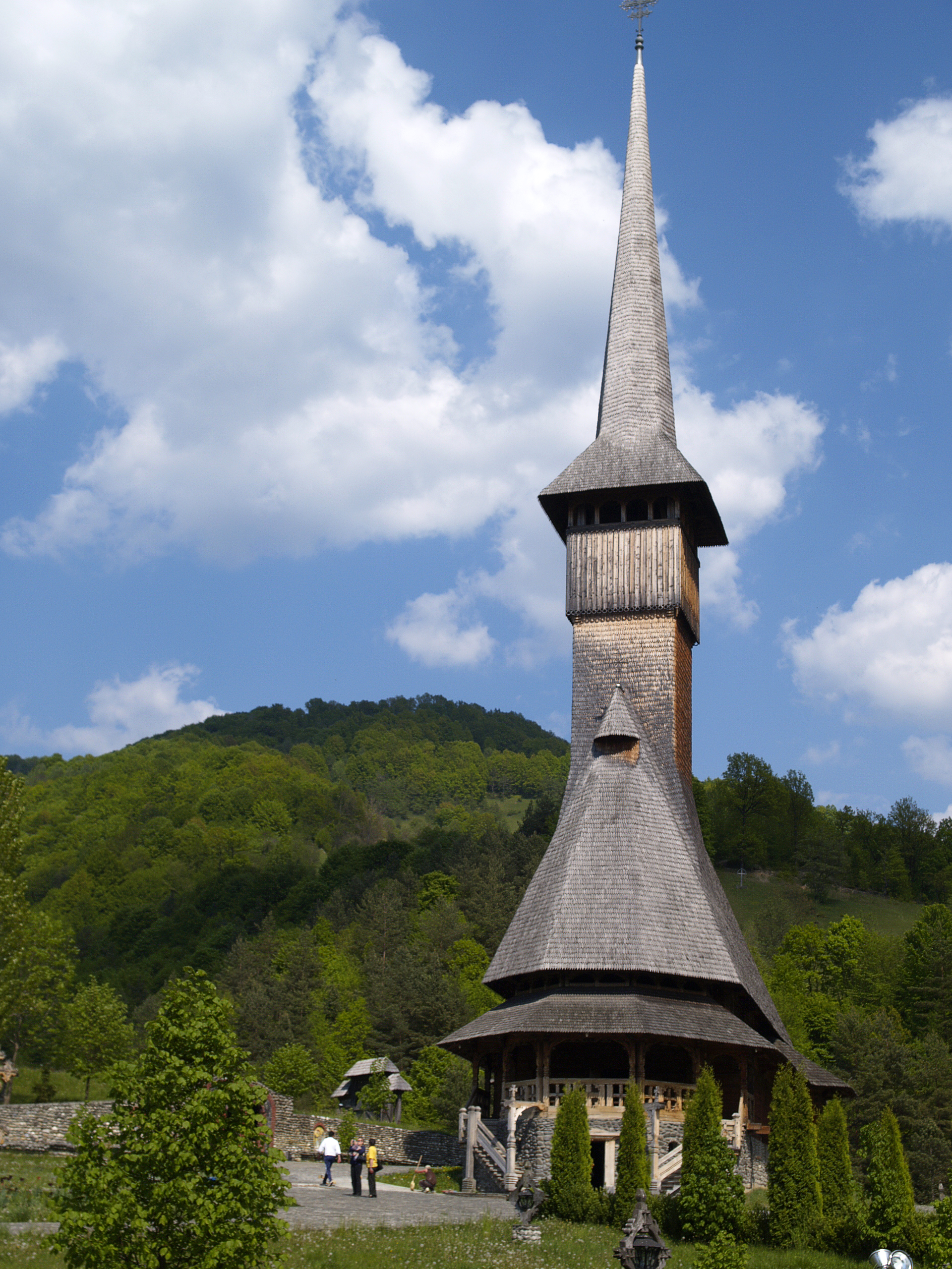 Wooden Church in Bärsana, Maramuresch, Romania